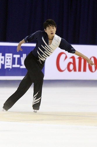 У Цзялян на Кубке Китая 2011.